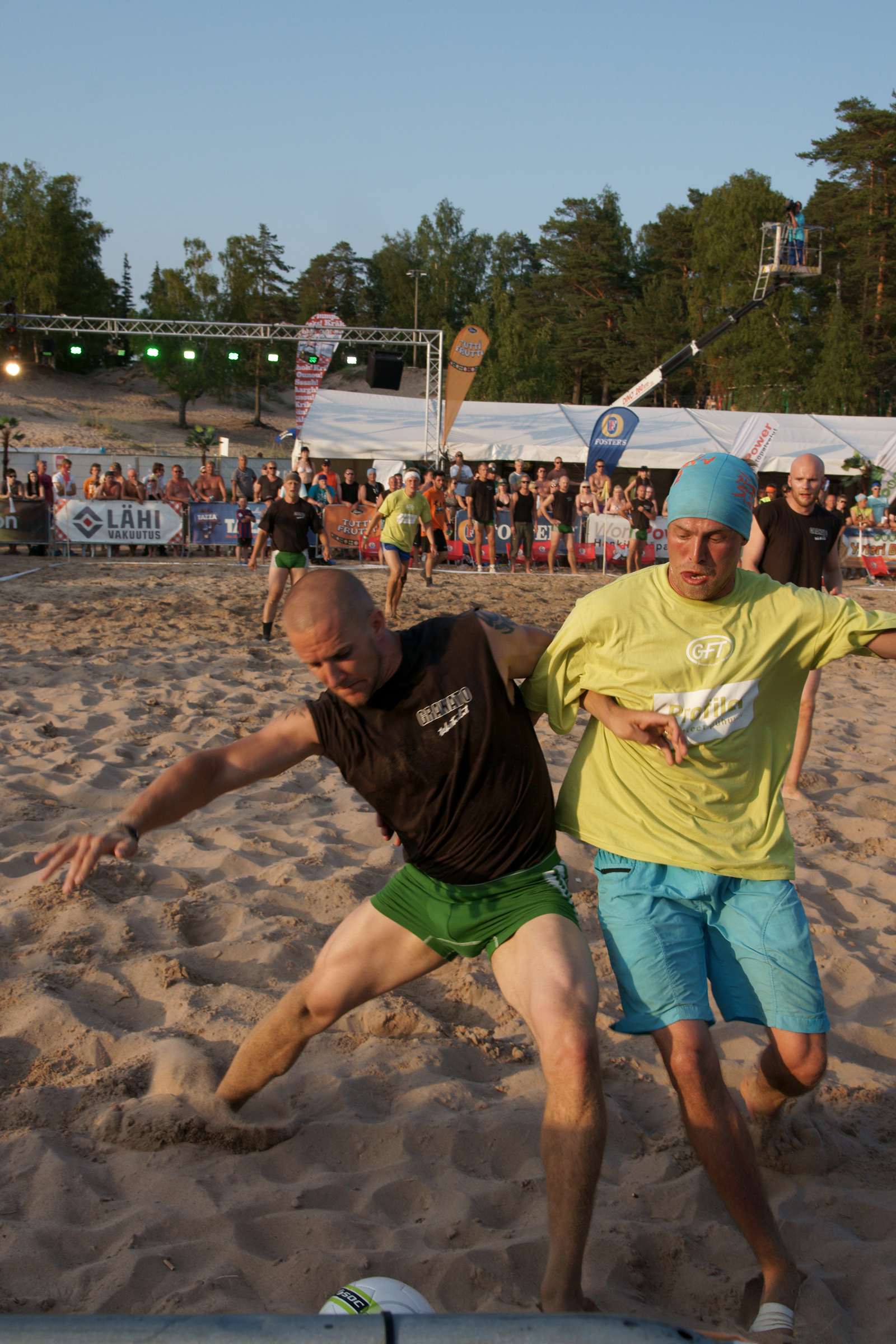 BF Mesikämmenen puolustaja yrittää pitää kiinni GFT Team Beachin Henrik Henrikssonista.